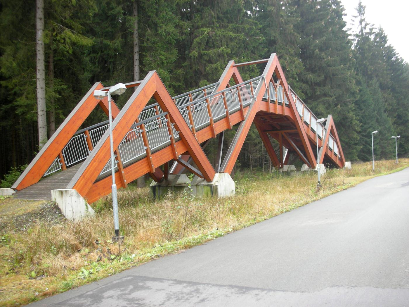 Brücke an der Loipe zwischen Grünbach und Muldenberg, aufgelistet im Schwarzbuch der Steuerzahler